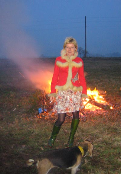 Die Künstlerin Cornelia Schleime, 2005